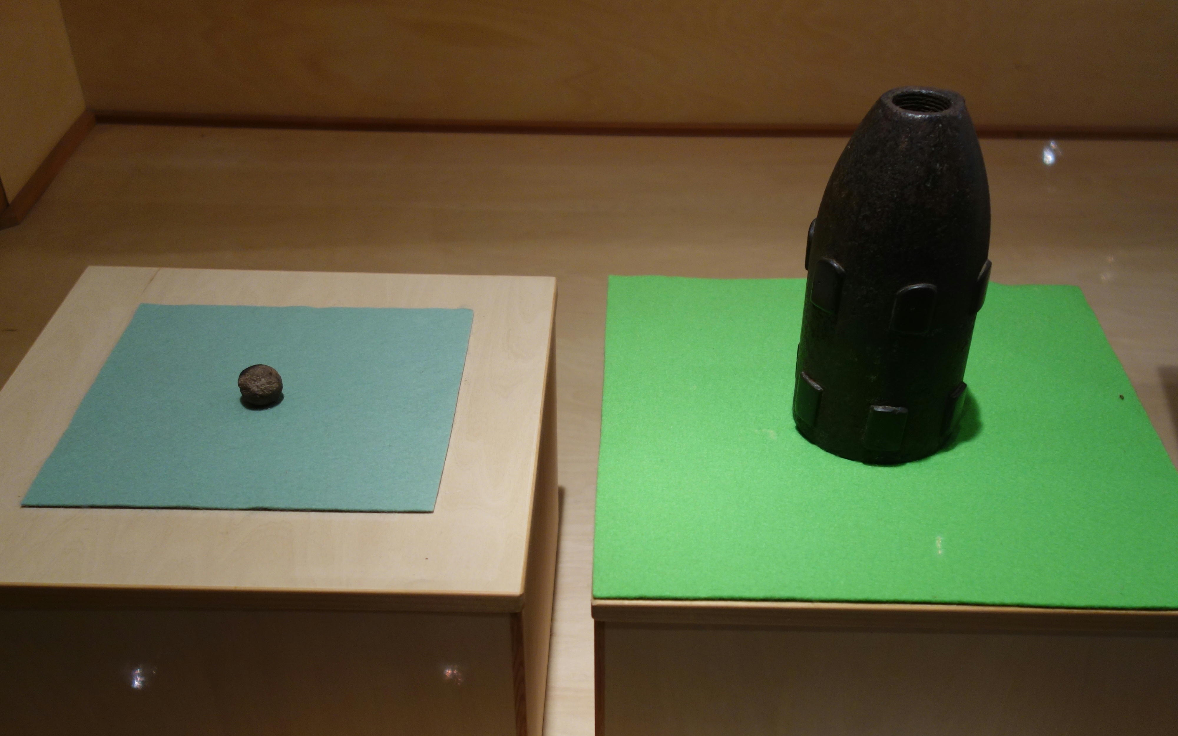 戊辰戦争の大館戦で使われた陶丸(左)と、アームストロング砲弾(右) アームストロング砲弾は大館城の堀から昭和25年ごろに発掘されたもの 大館郷土博物館で展示されている